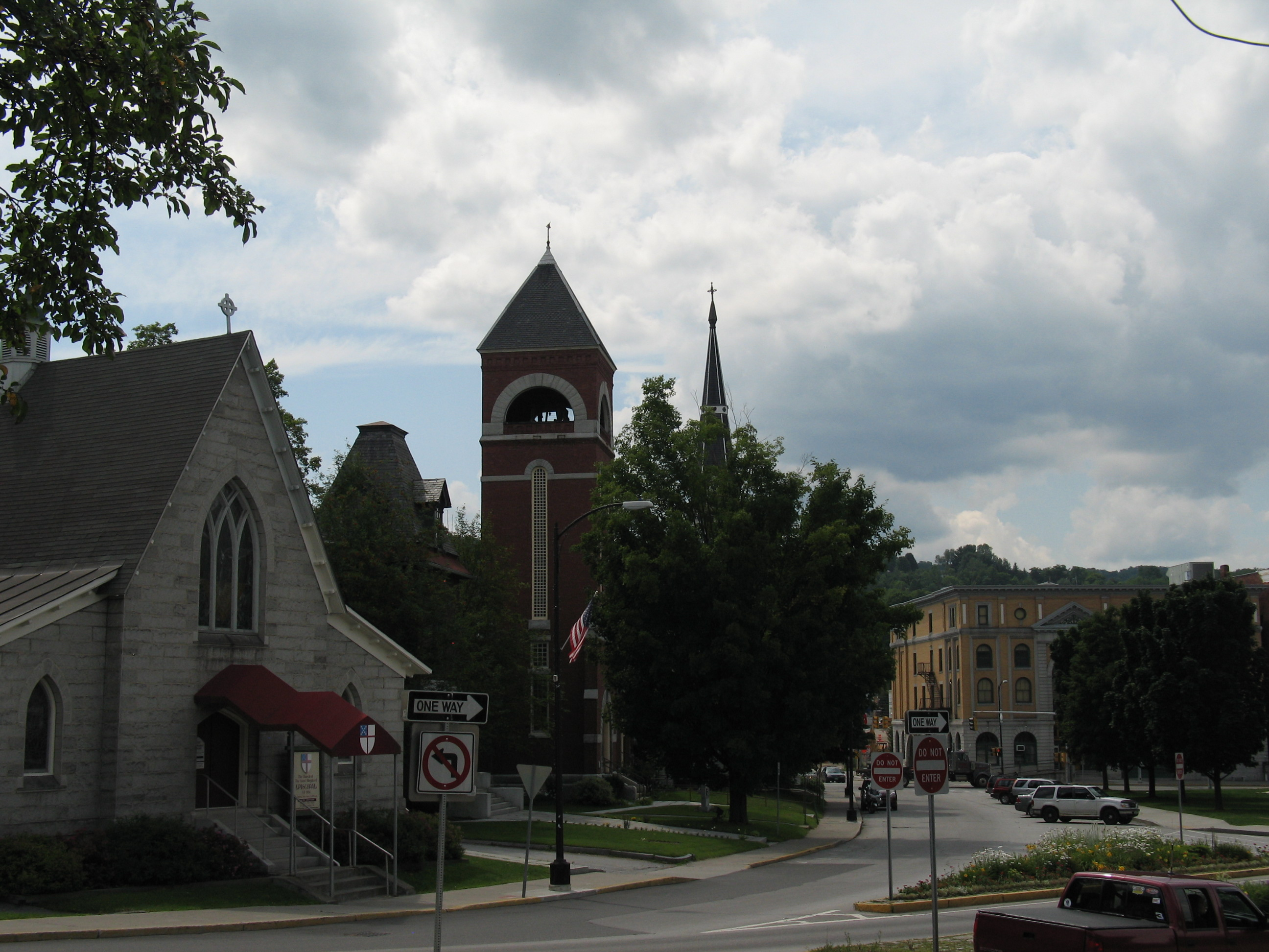 Stadhuis op de achtergrond in Barre, Vermont